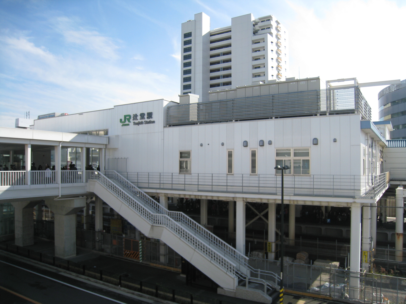 辻堂駅東口改札（北口・南口）